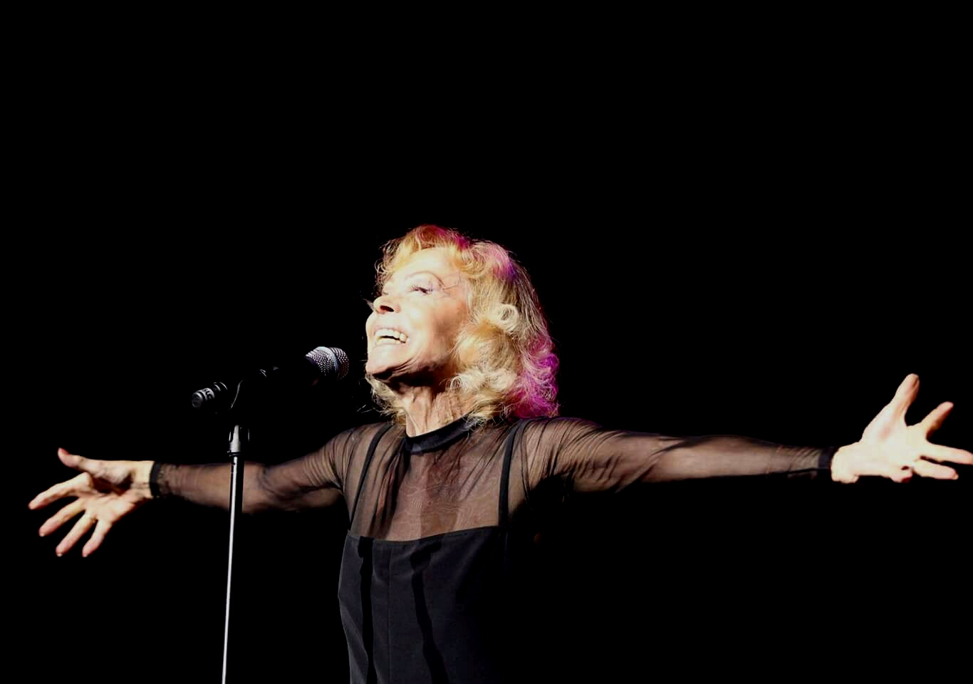 Isabelle Aubret, en janvier 2017, sur la scène d'Âge Tendre, la tournée des idoles